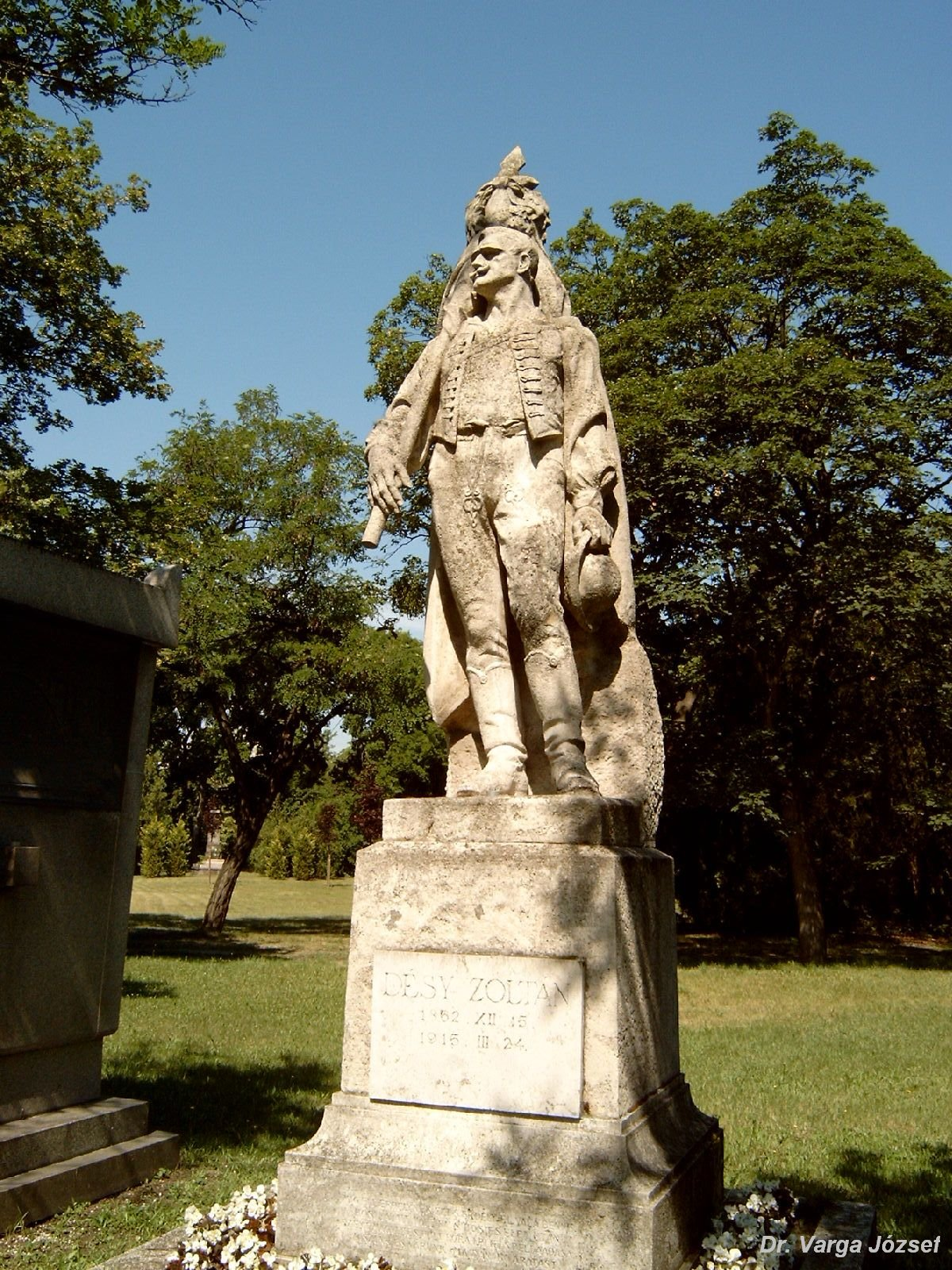 Désy Zoltán (Nagyölyves, 1862. december 15. – Zalesczyki, Galícia, 1915. március 24.) függetlenségi párti, majd Kossuth-párti politikus sírja Budapesten. Kerepesi temető: 10/1-1-3 [szobrász: Siklódy Lőrinc]